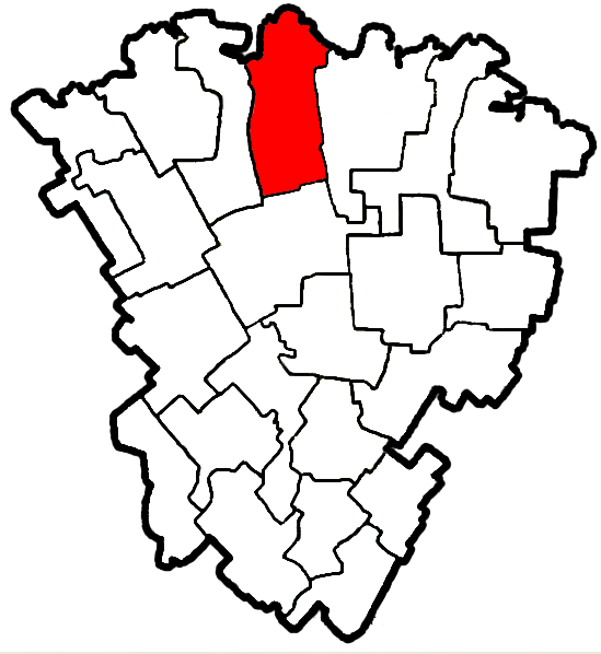 Котовська сільська рада, Магдалинівський район